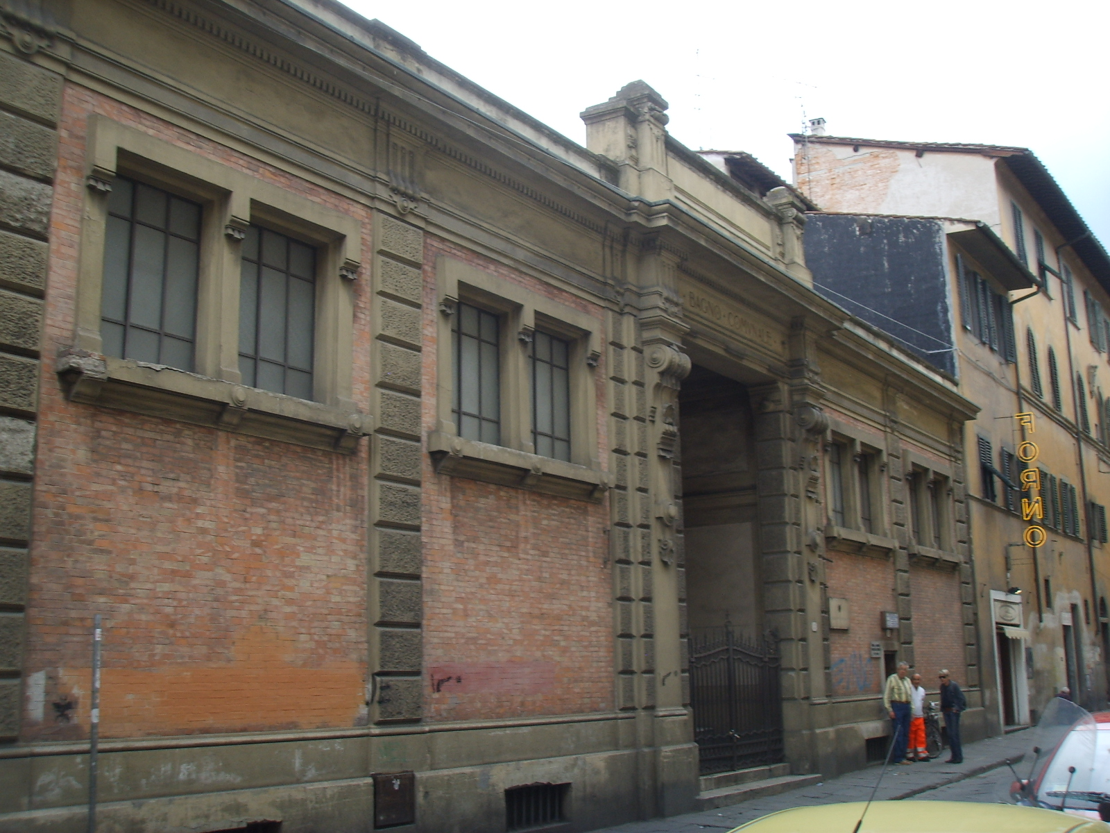 Bagno comunale, firenze